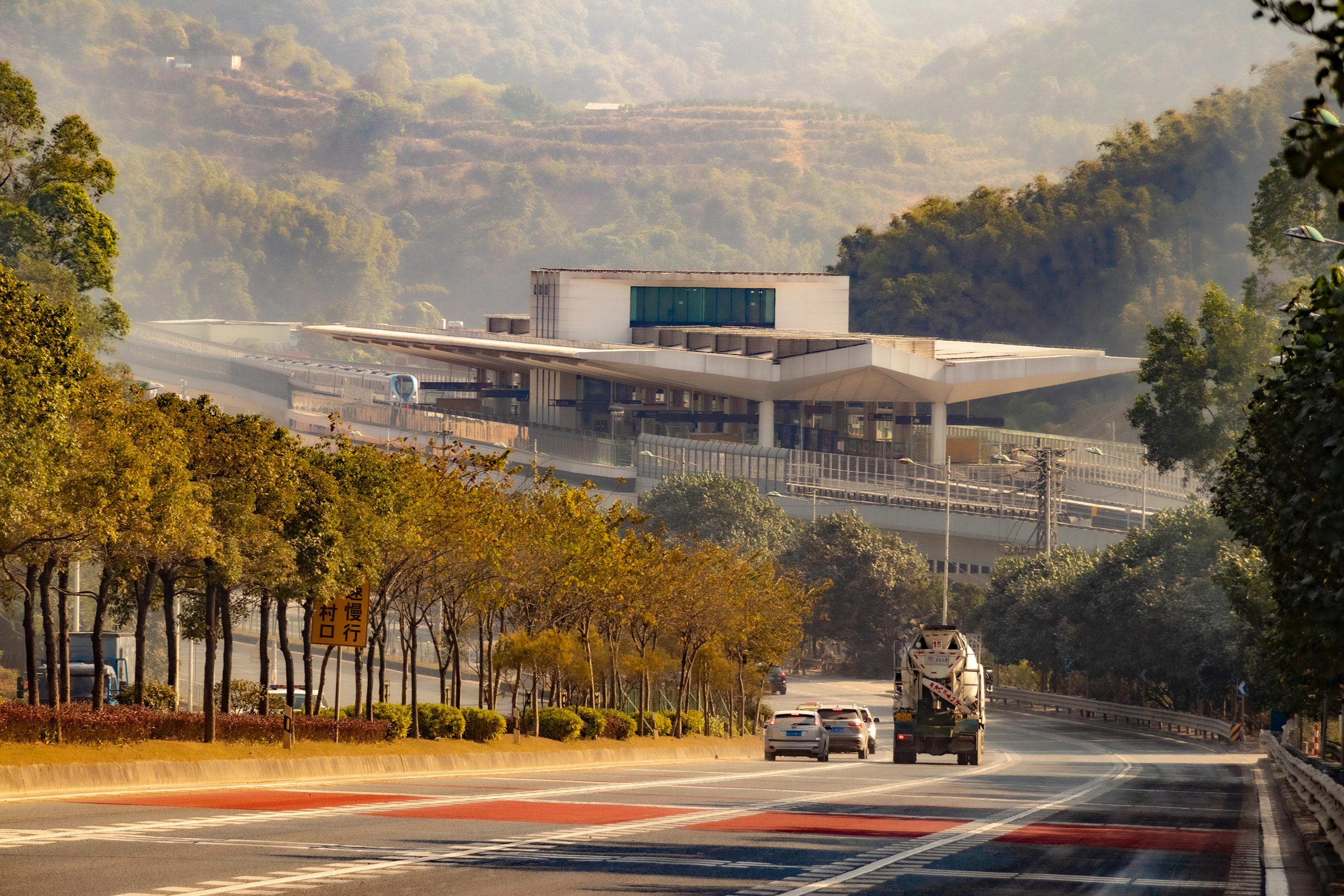 金坑站外观，摄于广汕公路